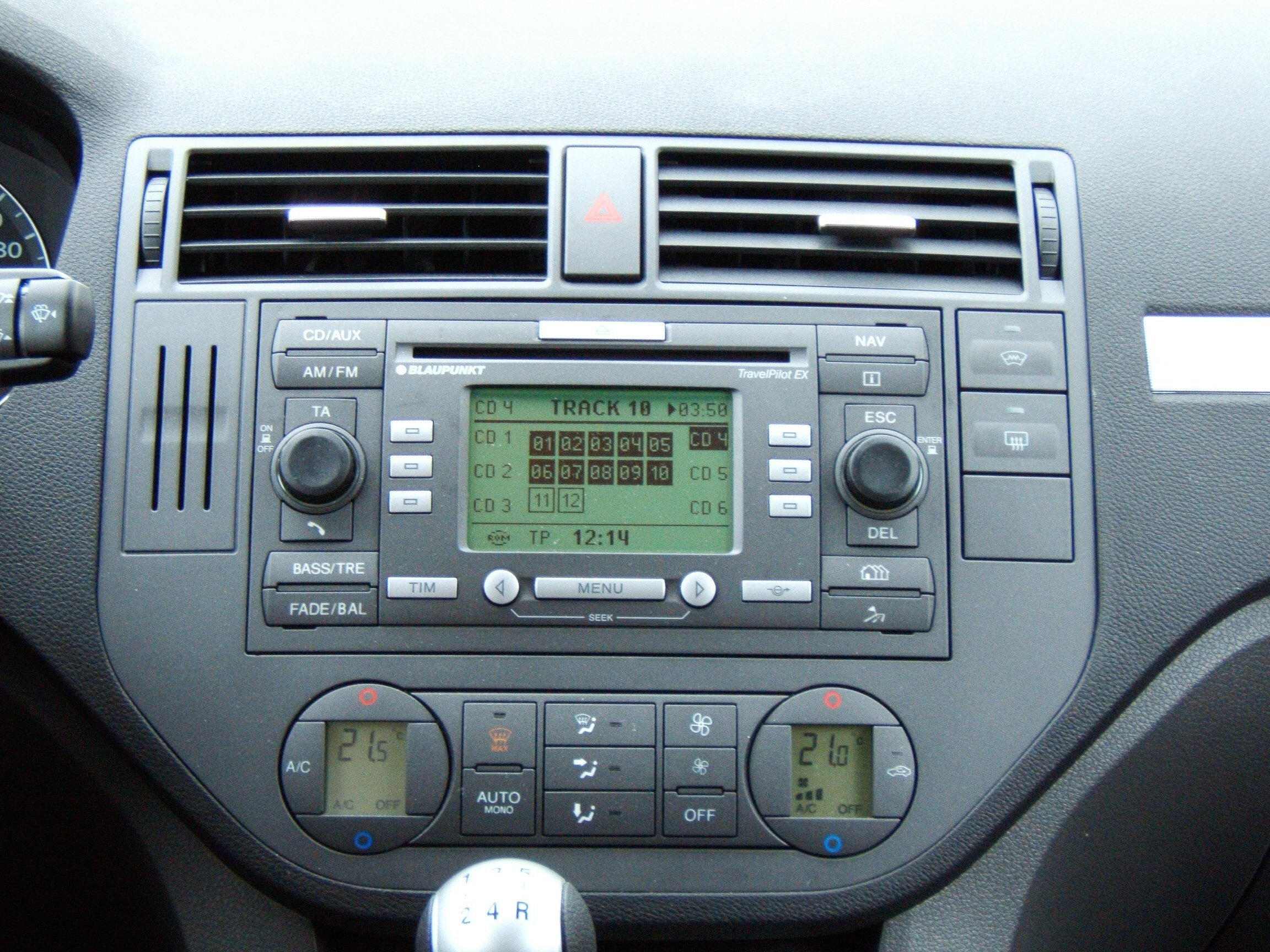 Categorie:Afbeelding auto